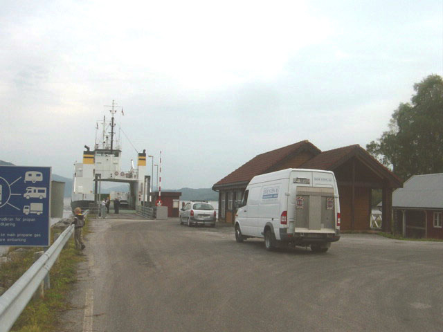 Hendset (Halsa) in Norway